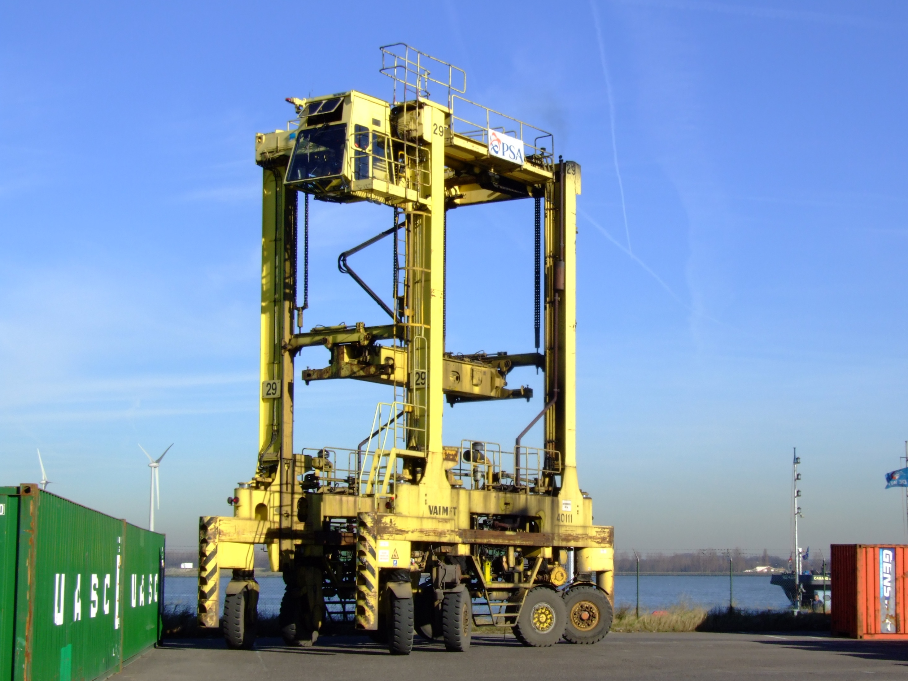 SISU Valmet 44011 Straddle carrier container mover.